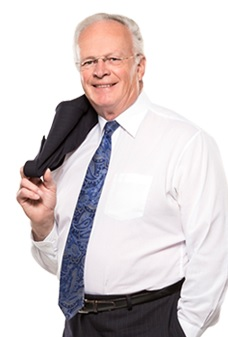 Photo de Robert Pouliot